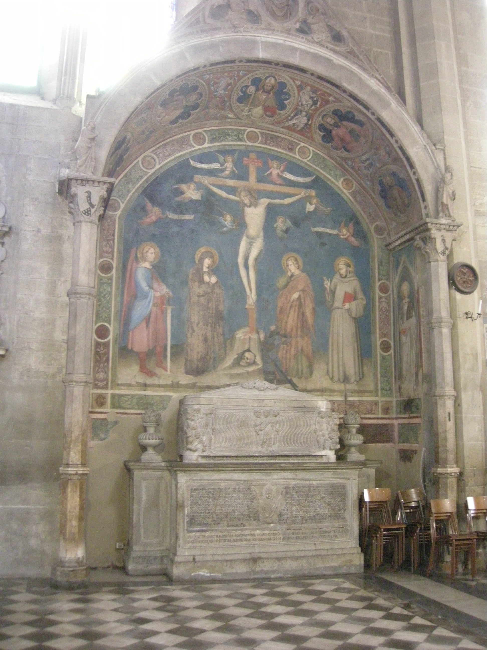 Duomo di arezzo, interno, monumento di ciuto tarlati, sarcofago del IV secolo e sculture by giovanni d'agostino e affreschi del maestro del vescovado